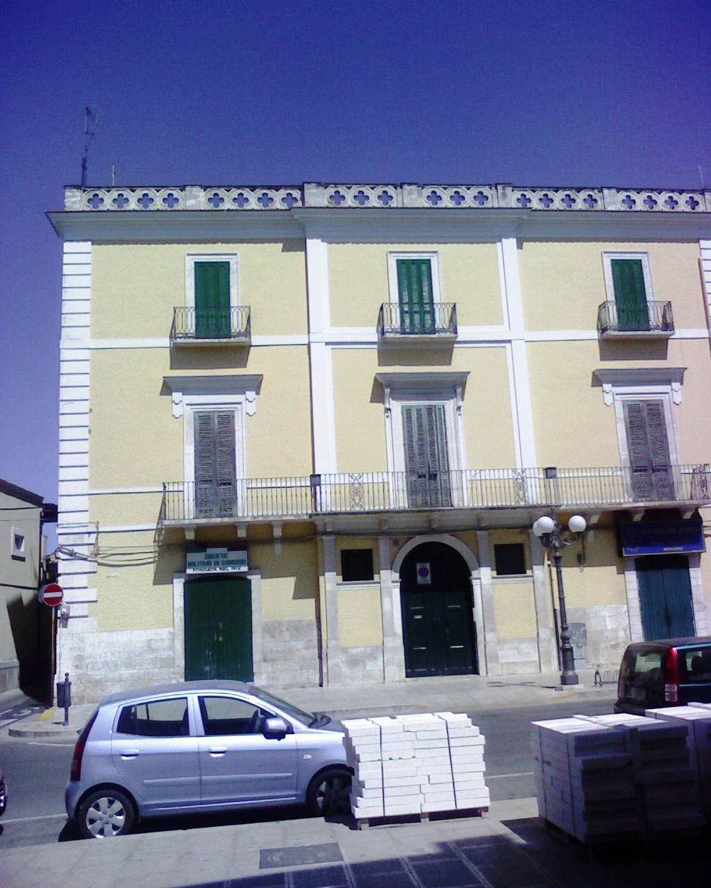 palazzo crispo- Modugno (bari)-Italy